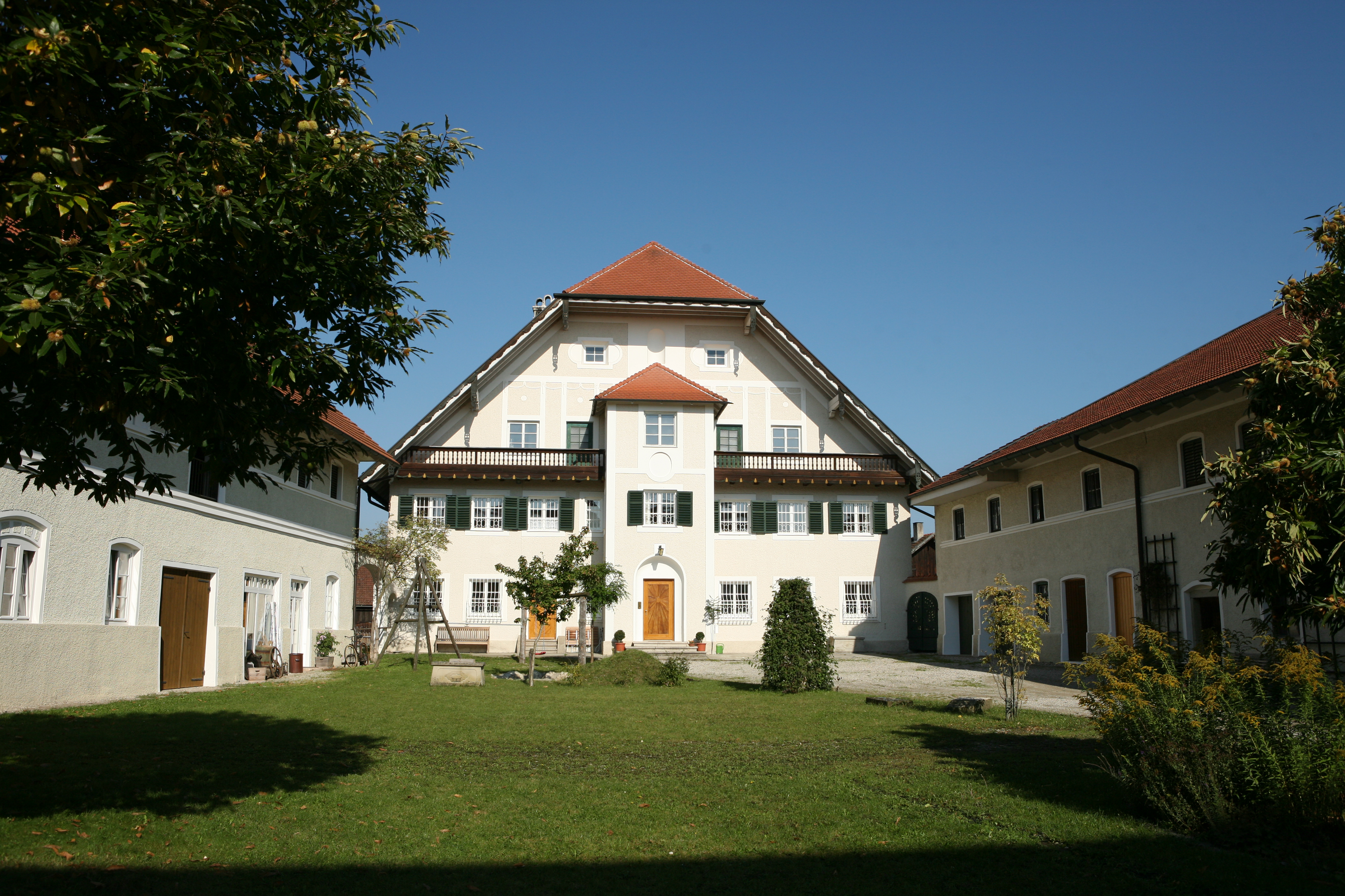 Bauerngehöft im Rottaler Baustil in Kirchham.